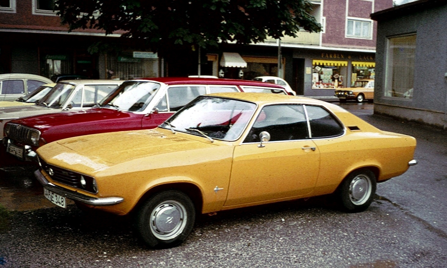 Opel Manta A (Baujahre 1970–1975)